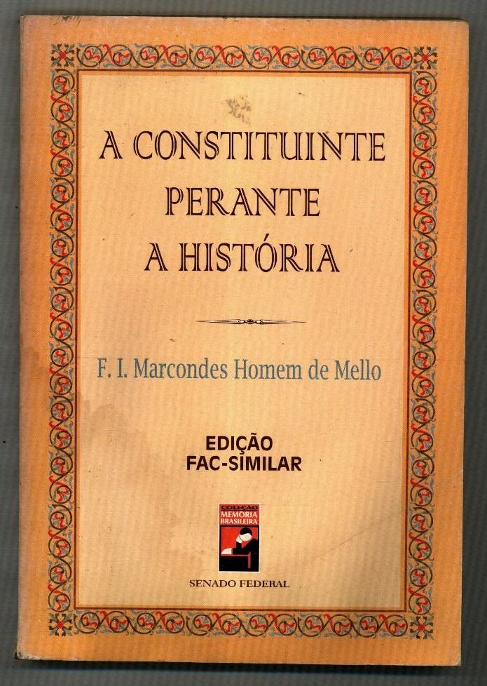 Livro a Constituinte Perante a História do Barão Homem de Melo.